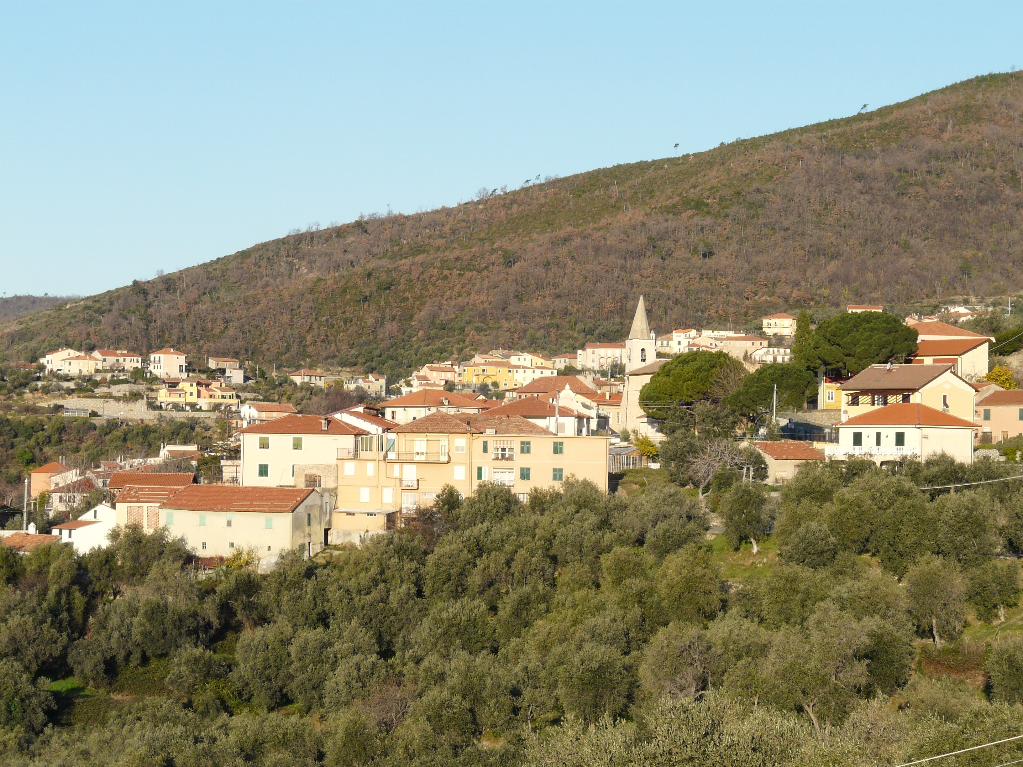 Arnasco, Liguria, Italia